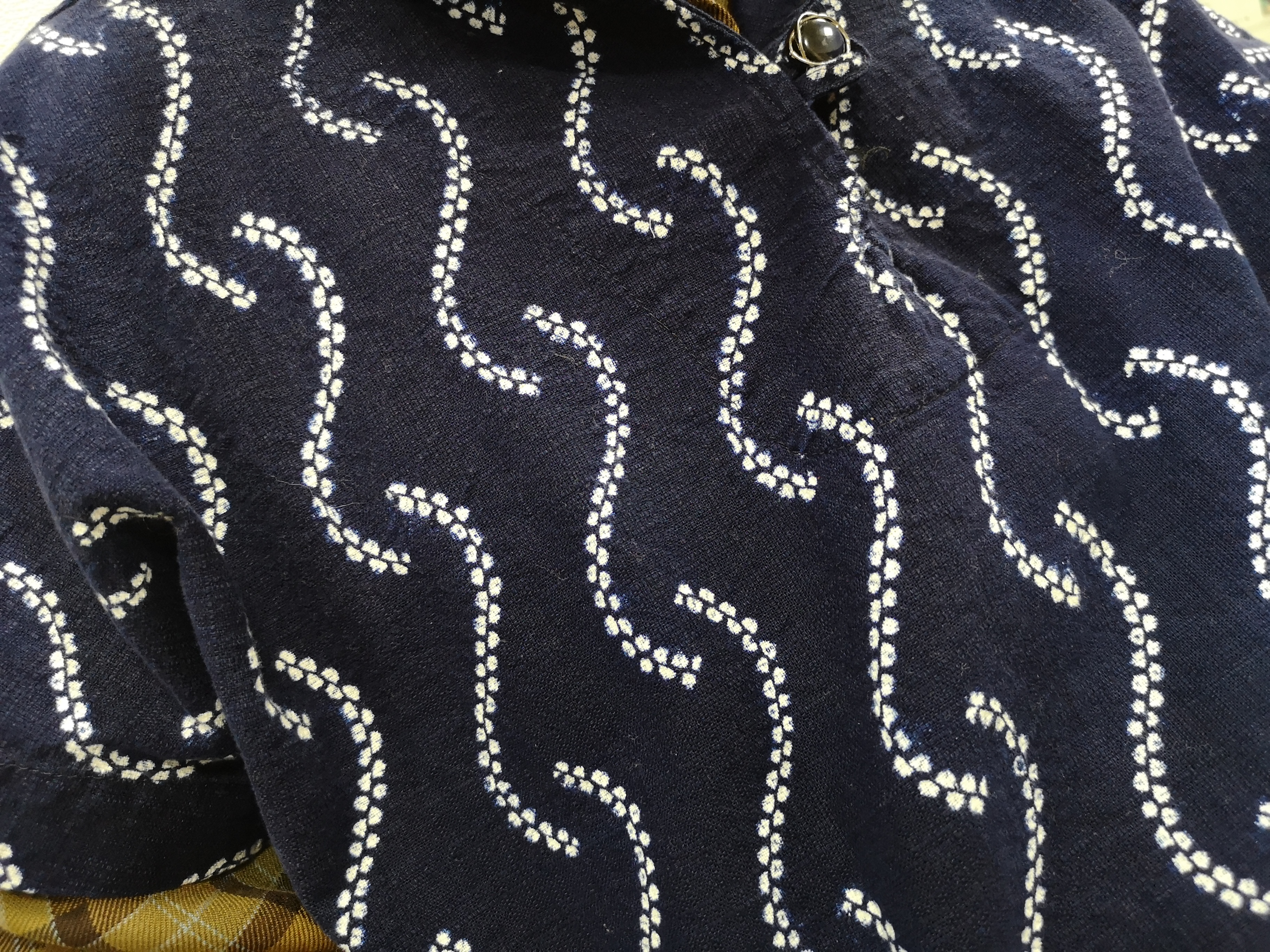 有松絞りの折縫い模様